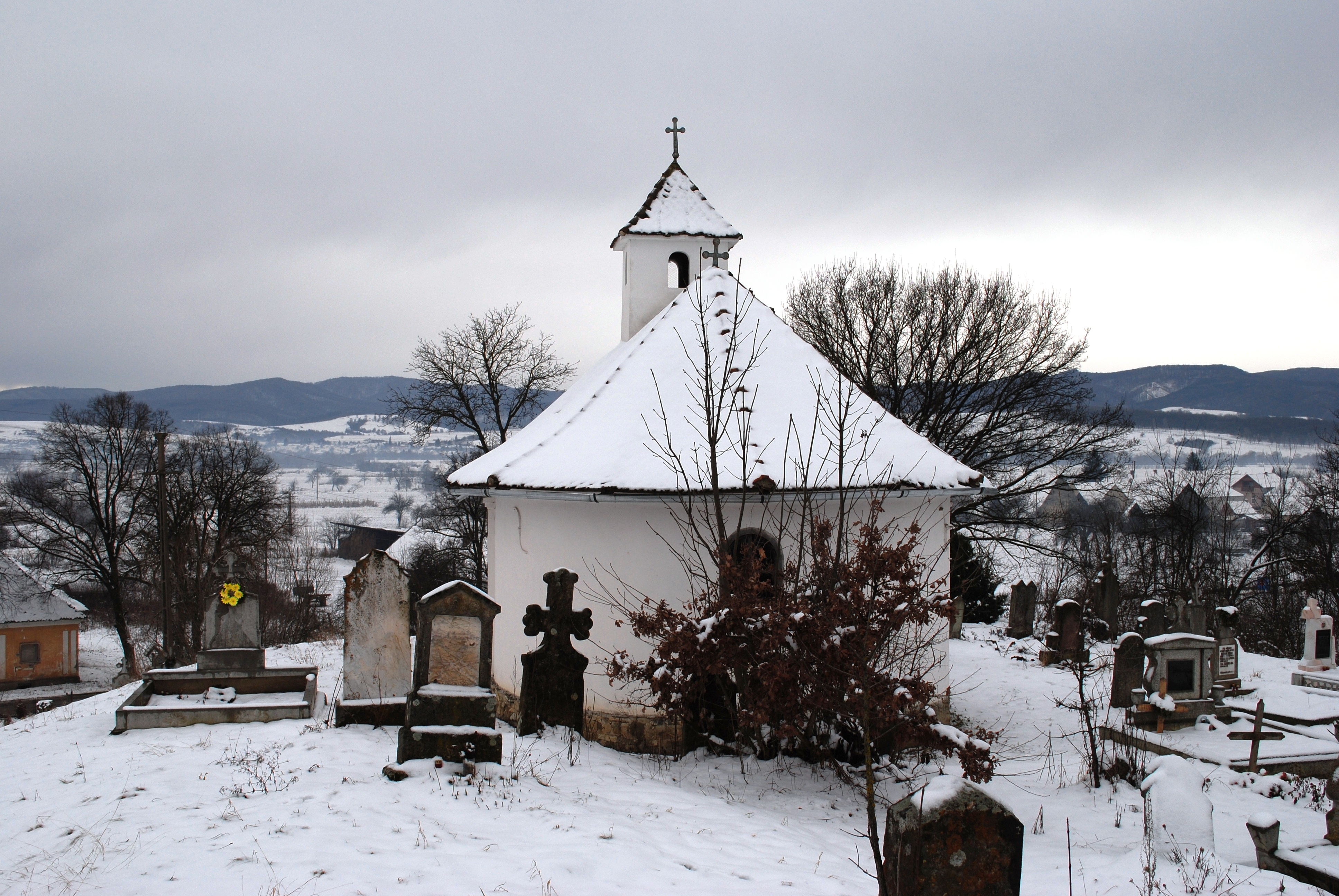 Biserica "Sf. Gheorghe" 1866